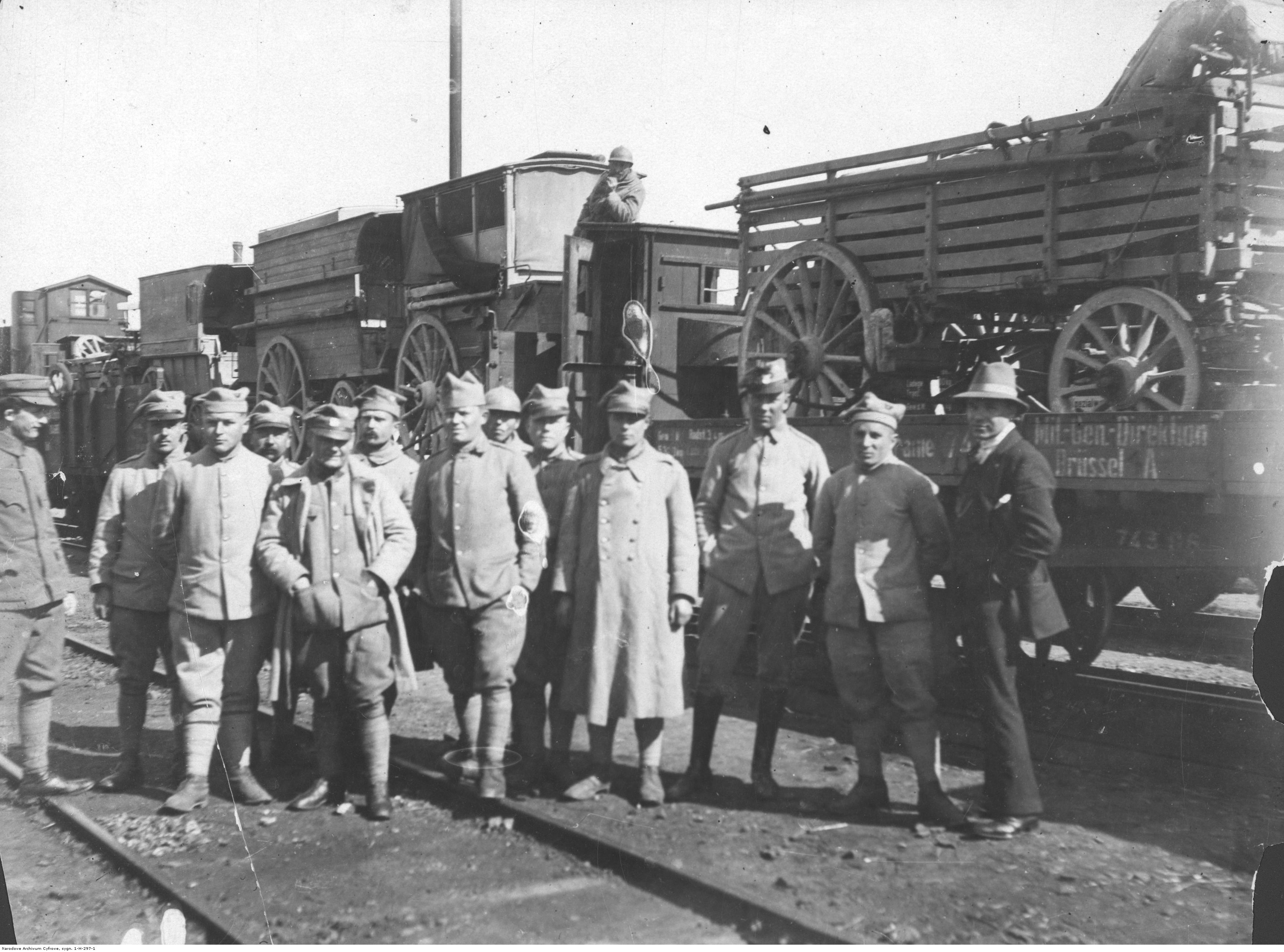 Transport oddziałów armii generała Józefa Hallera z Francji do Polski. Żołnierze stojący na torowisku przy pociągu transportującym sprzęt wojskowy. Koncern Ilustrowany Kurier Codzienny - Archiwum Ilustracji. Sygnatura: 1-H-297-1